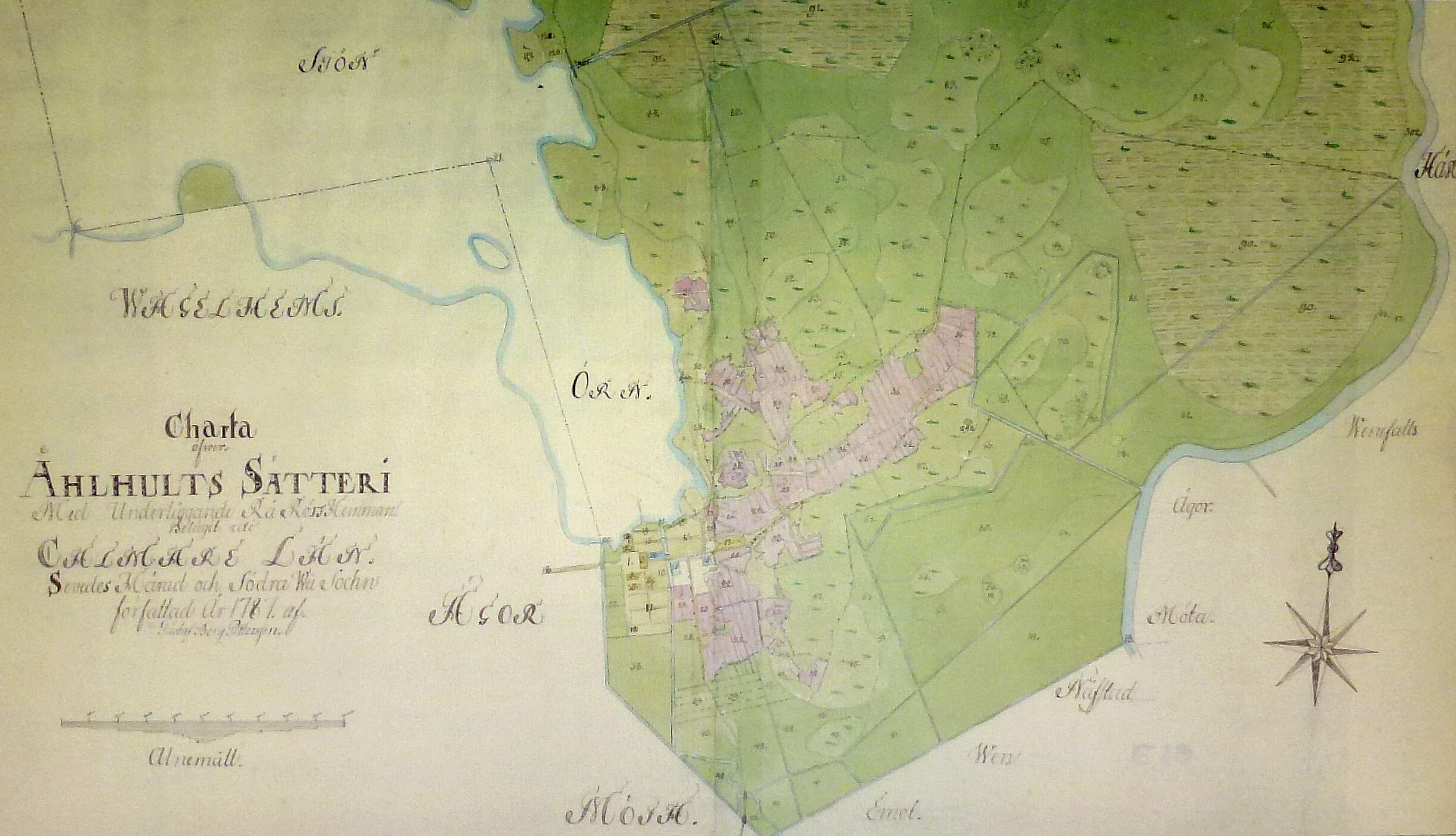 Åhlhults Sätteri Charta 1781, Arealavmätning och rågångskarta